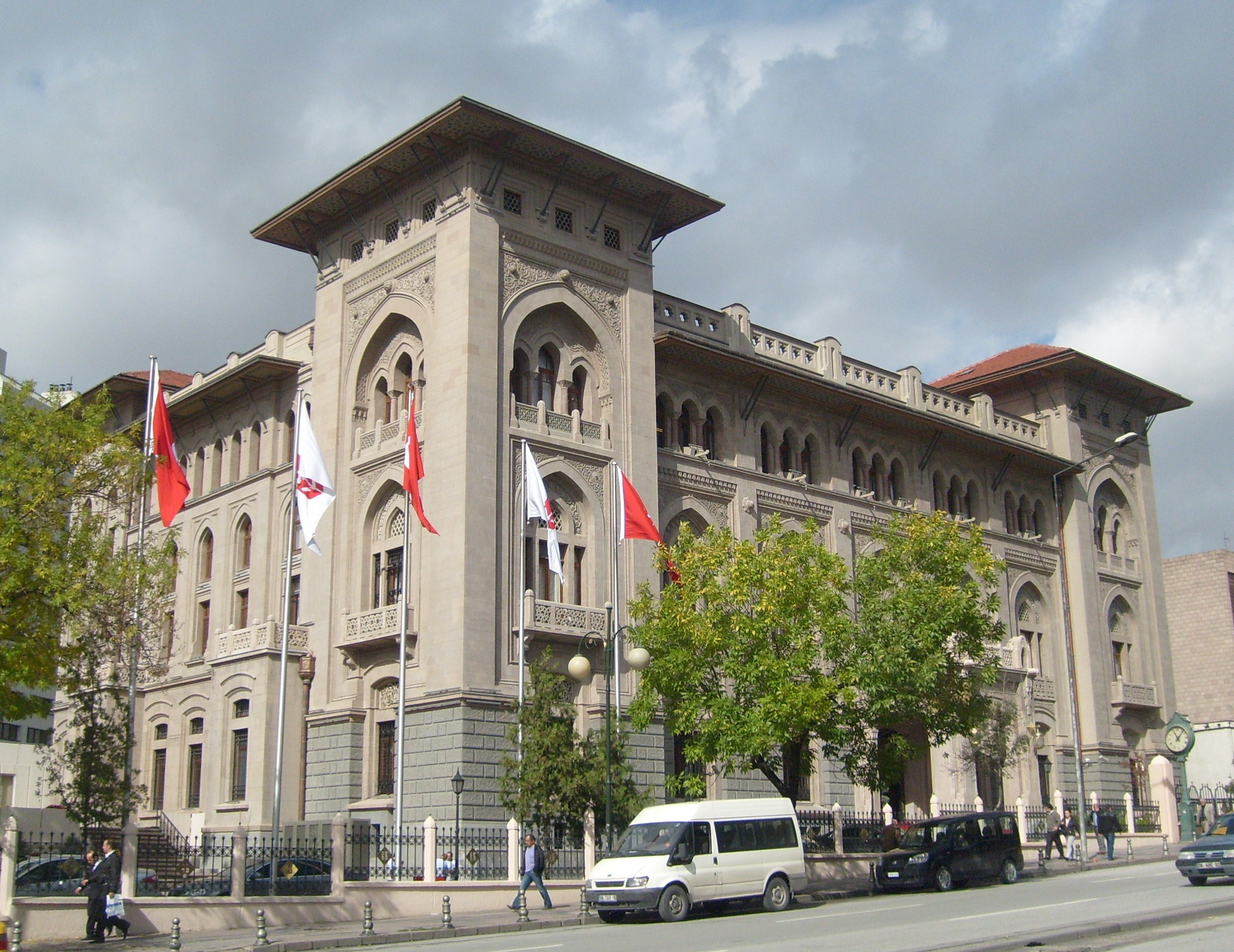 T.C Ziraat Bankası Genel Müdürlük binası. 1926-1929 yılları arasında İtalyan Mimar Giulio Mongeri tarafından inşa edilmiştir.